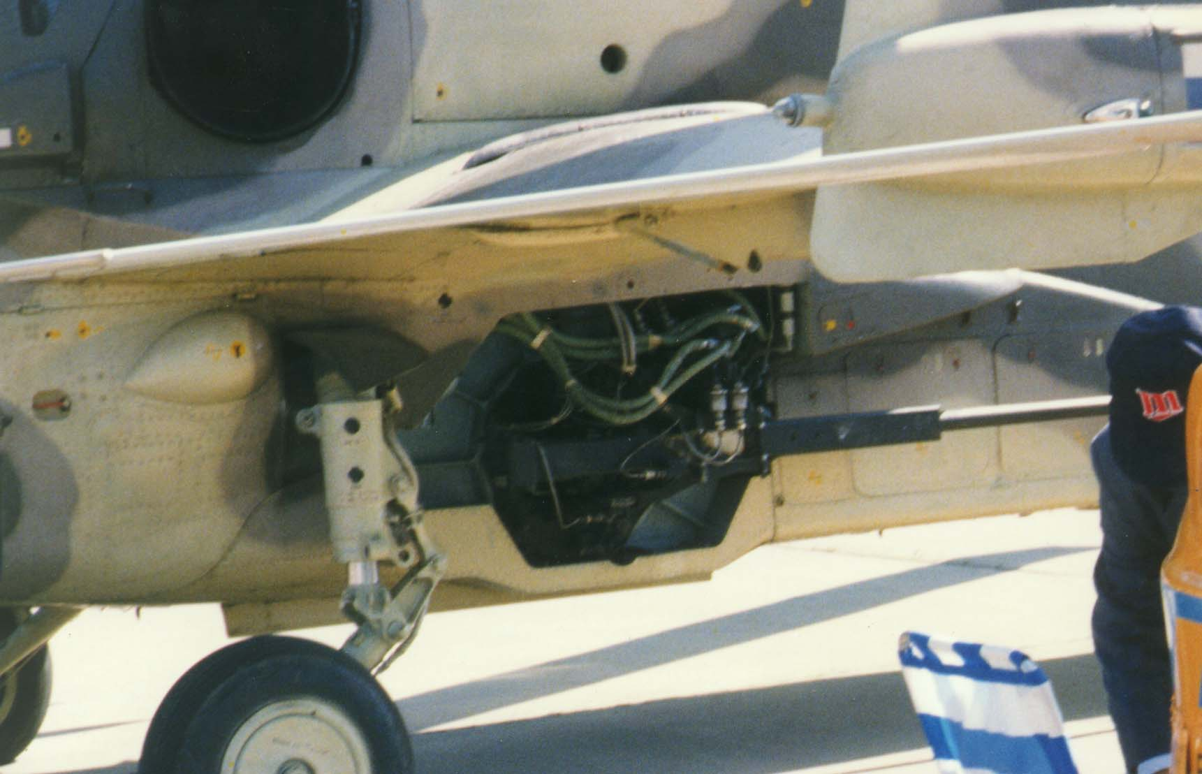 Bordkanone des Ka - 50